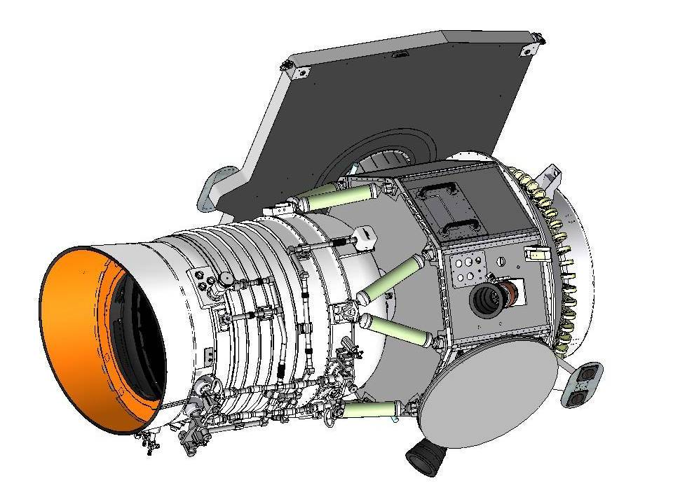 Wide-Field Infrared Survey Explorer (WISE) — инфракрасный космический телескоп НАСА, запущенный на околоземную орбиту 14 декабря 2009 года с целью получения глобального обзора неба в инфракрасном диапазоне.